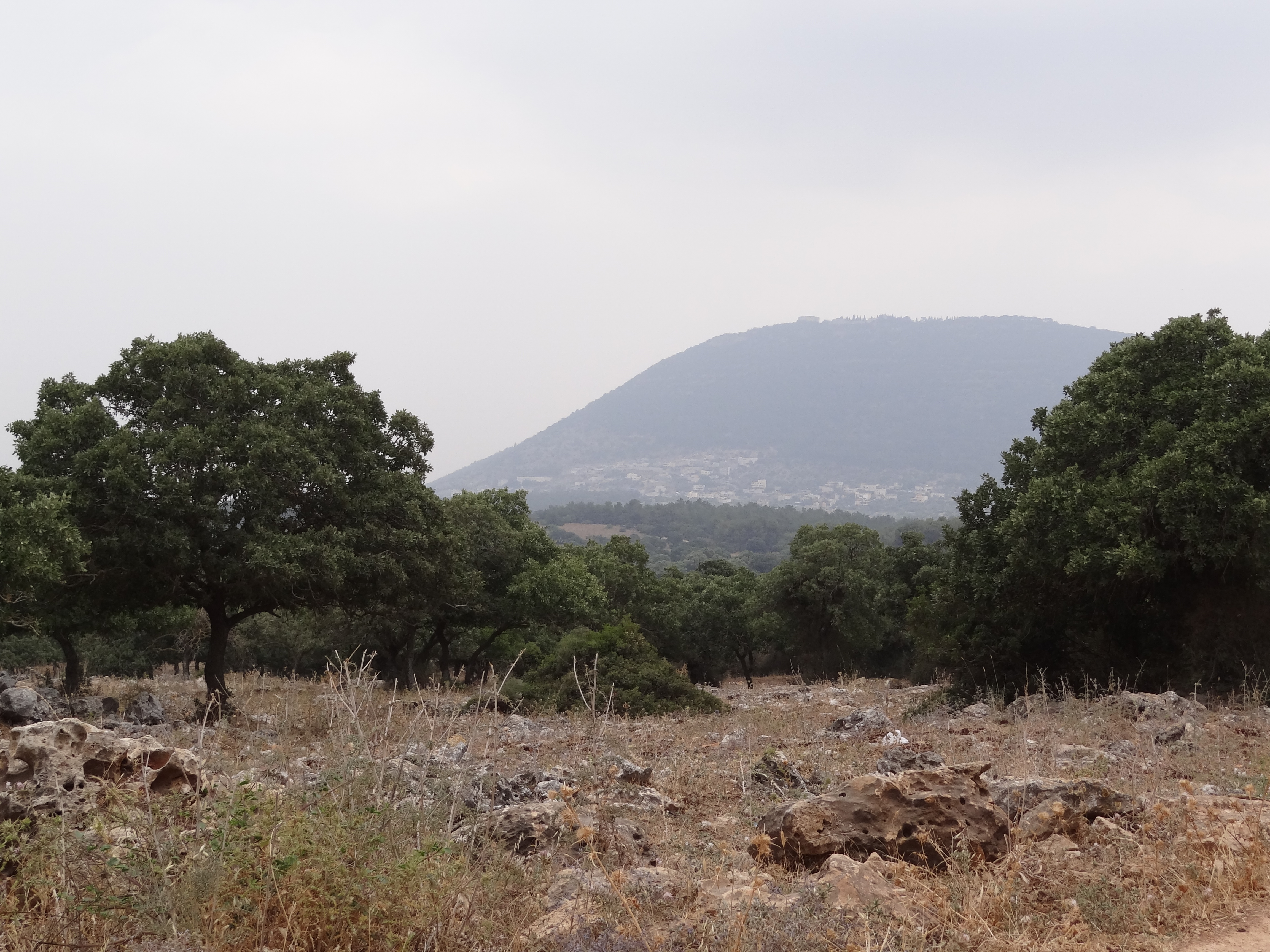 שמורת אלוני בית קשת היא שמורת טבע מוצעת של עצי אלון התבור המשתרעת על פני שטח של 5,054 דונם במורדות המזרחיים של הרי נצרת. ממערב מצפון ומדרום לקיבוץ בית קשת.